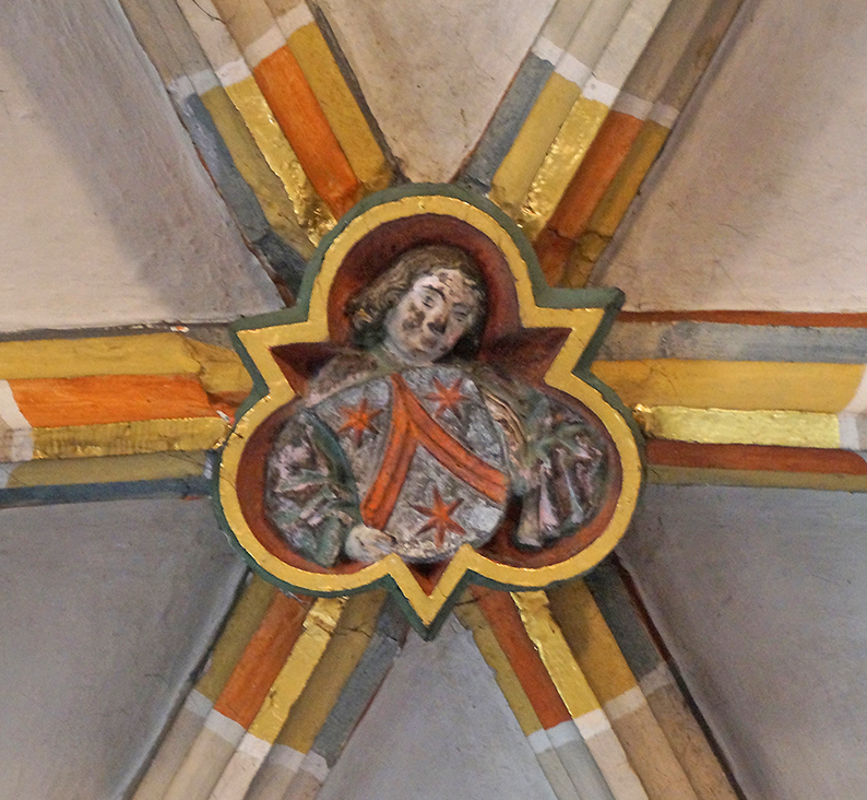 Schlussstein in der Sakristei der Bartholomäuskirche in Markgröningen: Aberlin Jörg, Baumeister